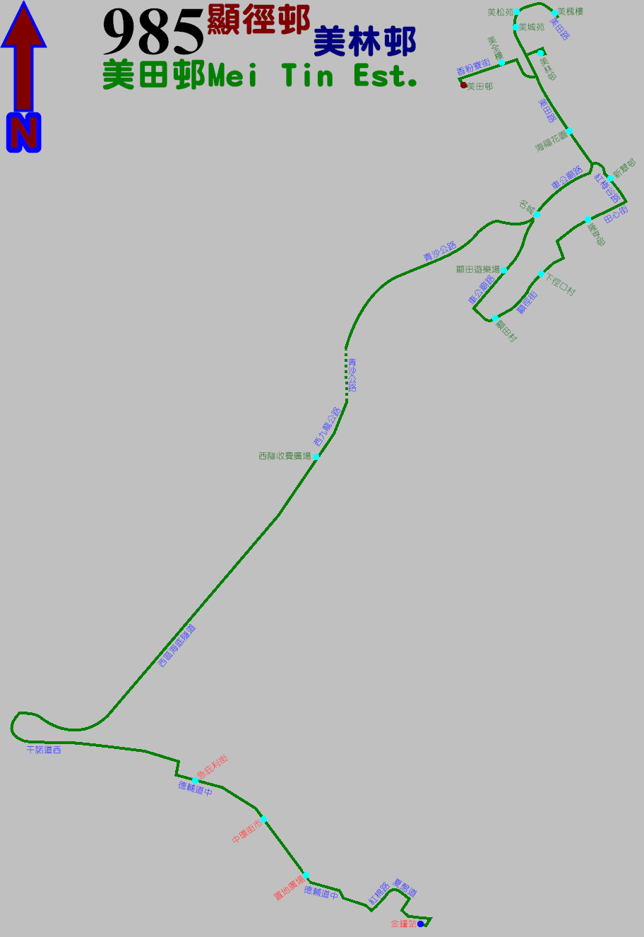 過海隧巴985線沙田方向的走線圖